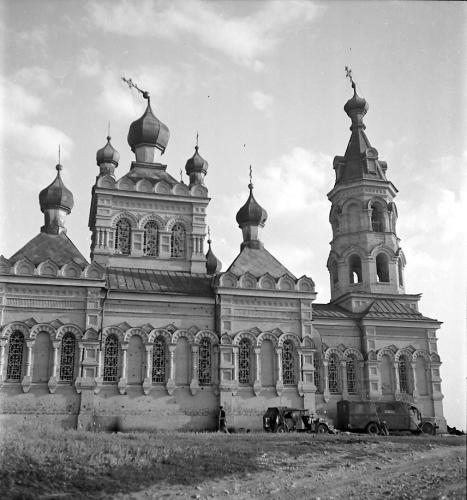 Покровский храм в станице Мешковская Ростовской области, 1942г.